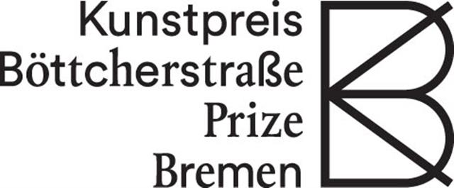 Logo Kunstpreis der Böttcherstraße